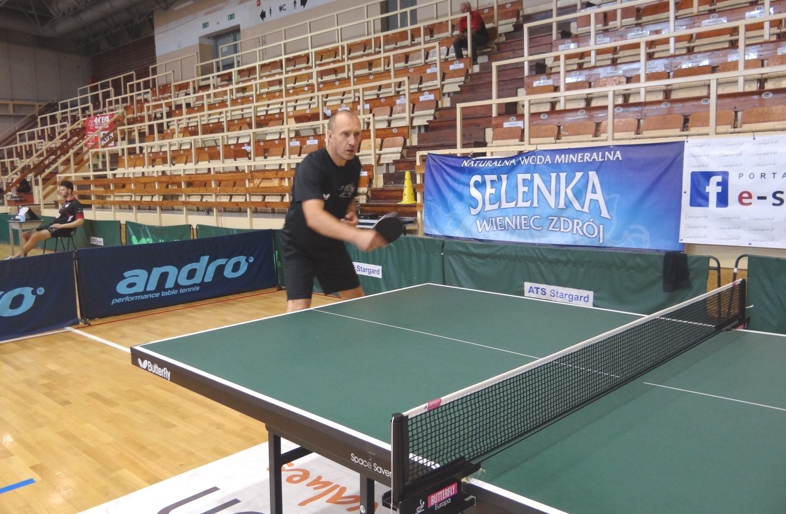 Bogusław Tymejczyk